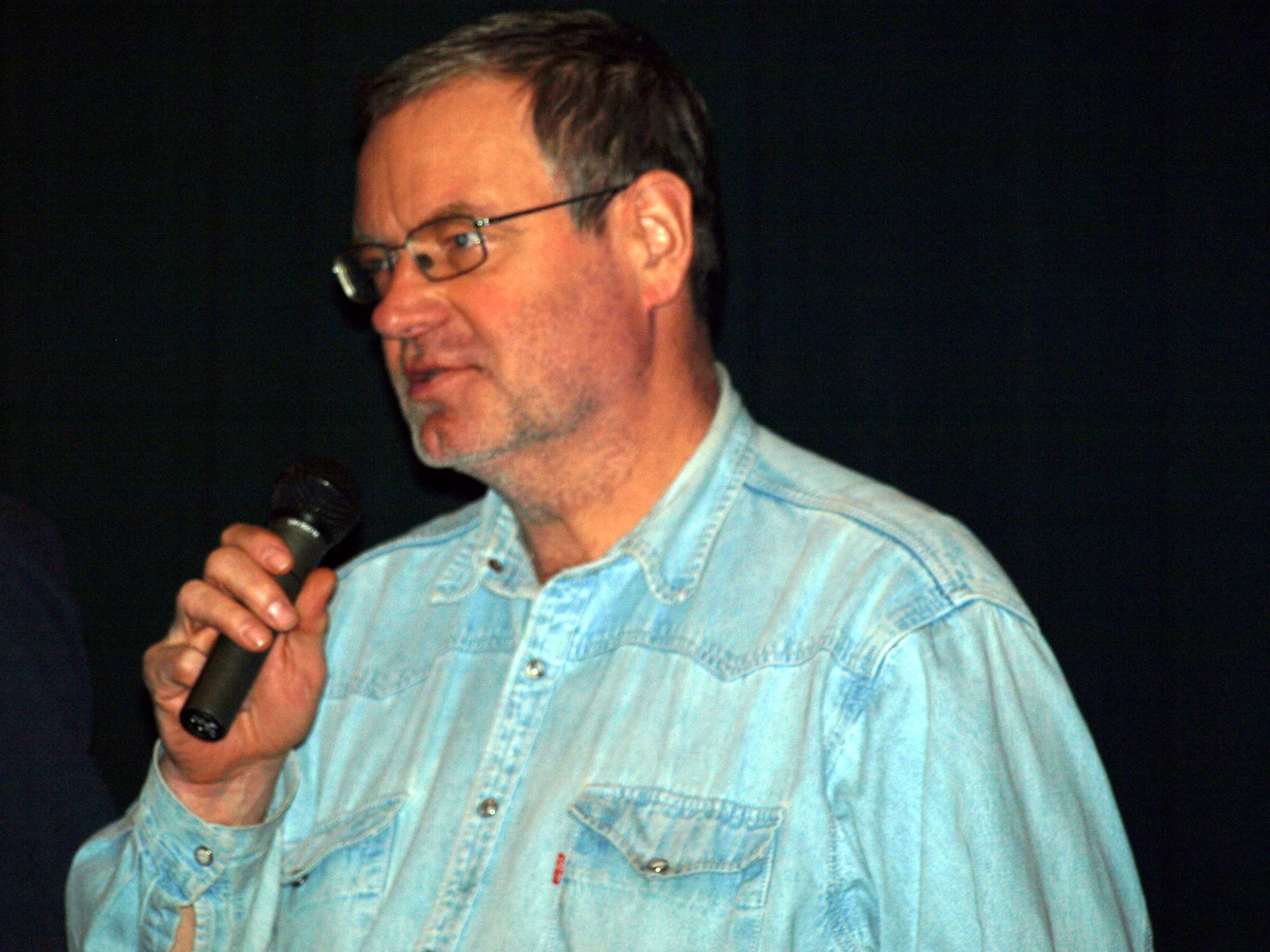 Novinářská konference - Blanka Borová pro FilmCZ & 10Mpix.cz